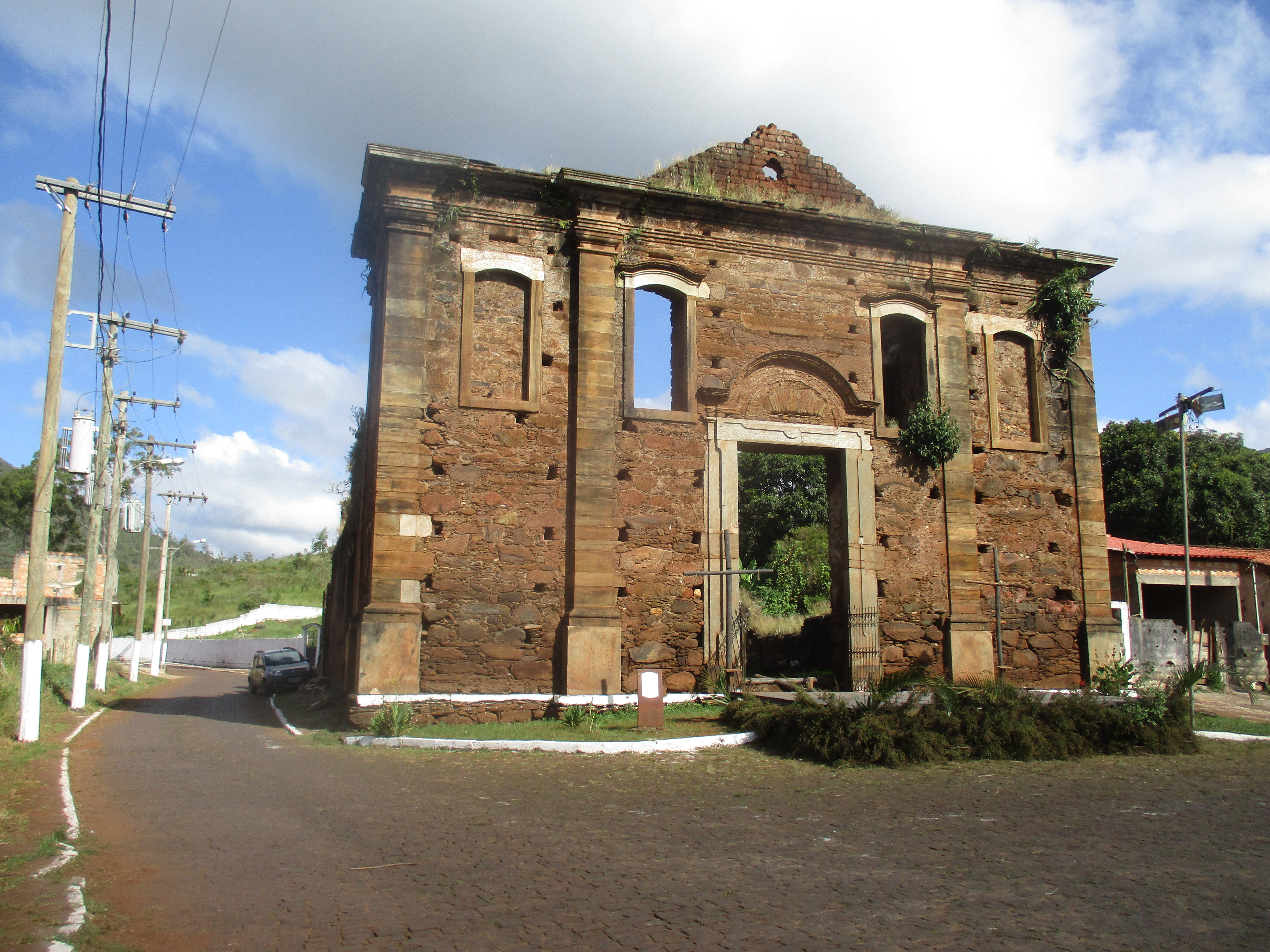 Igreja queimada em Antonio Pereira (século XVIII)